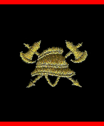 Brandweerman